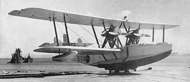 一五式飛行艇は、F5艇の後継機として広廠が設計した日本海軍で最初の国産飛行艇。